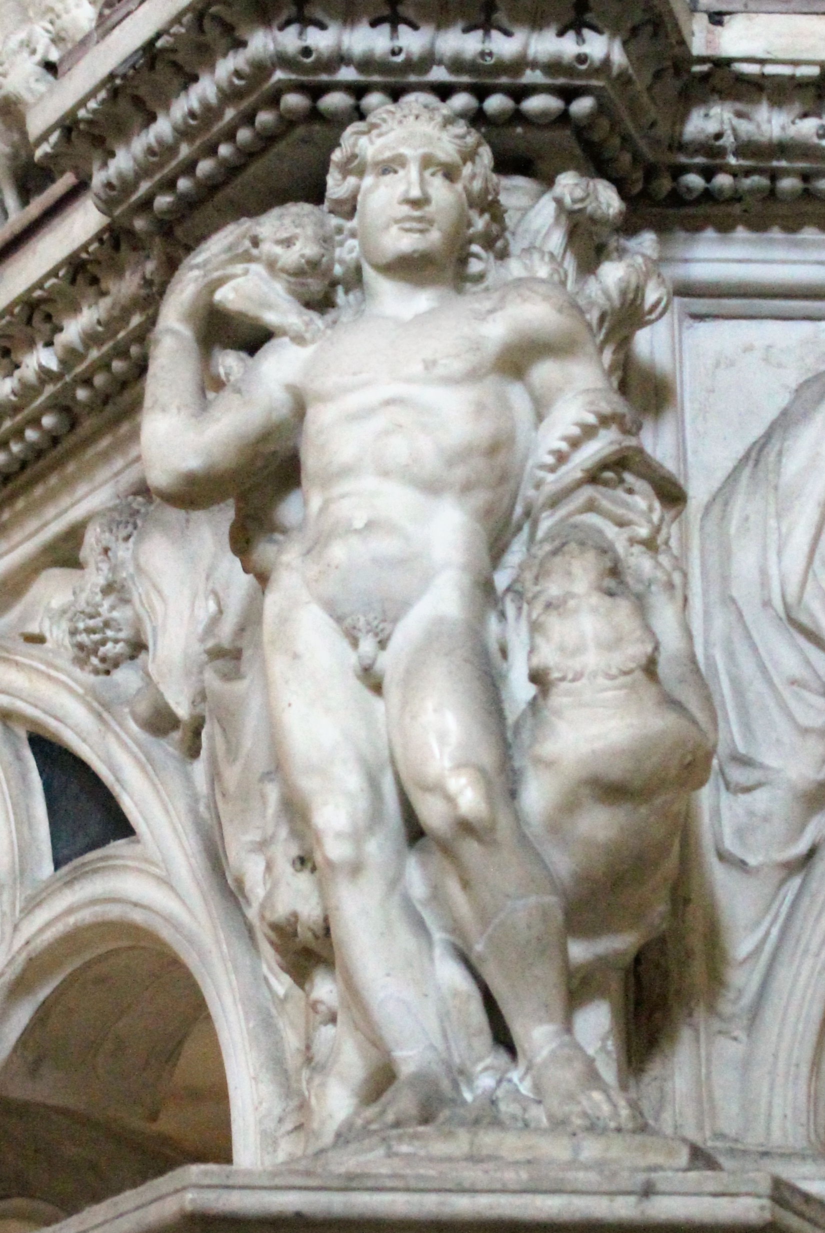 Figura da Fortitude com os atributos de Hércules, detalhe do púlpito do Batistério de Pisa.